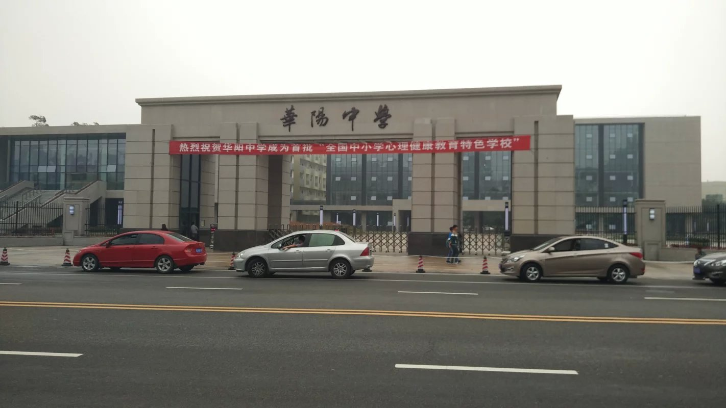 吴语: 华阳中学东大门